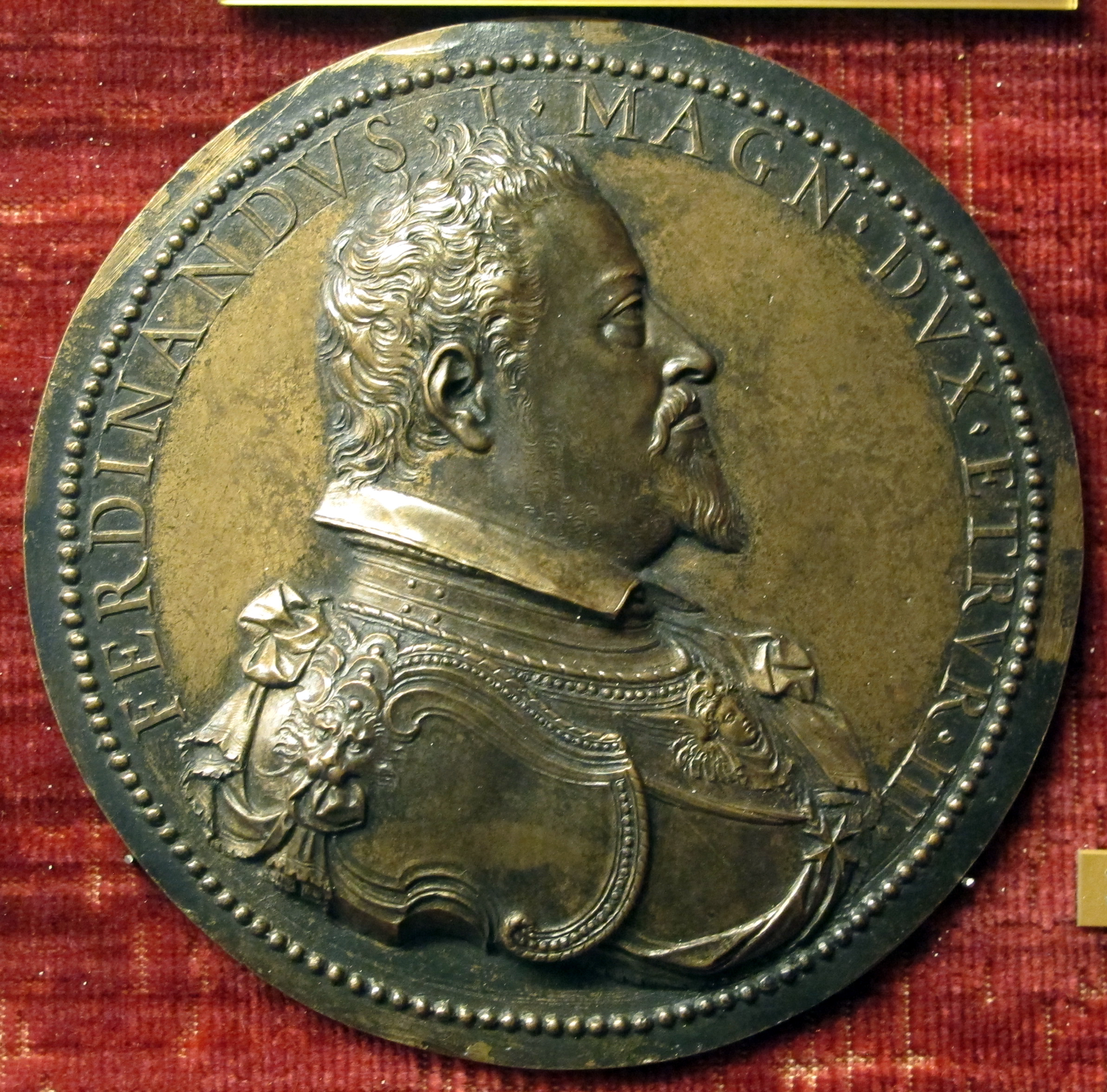 Gasparo mola, medaglia di ferdinando I de' medici (no verso)